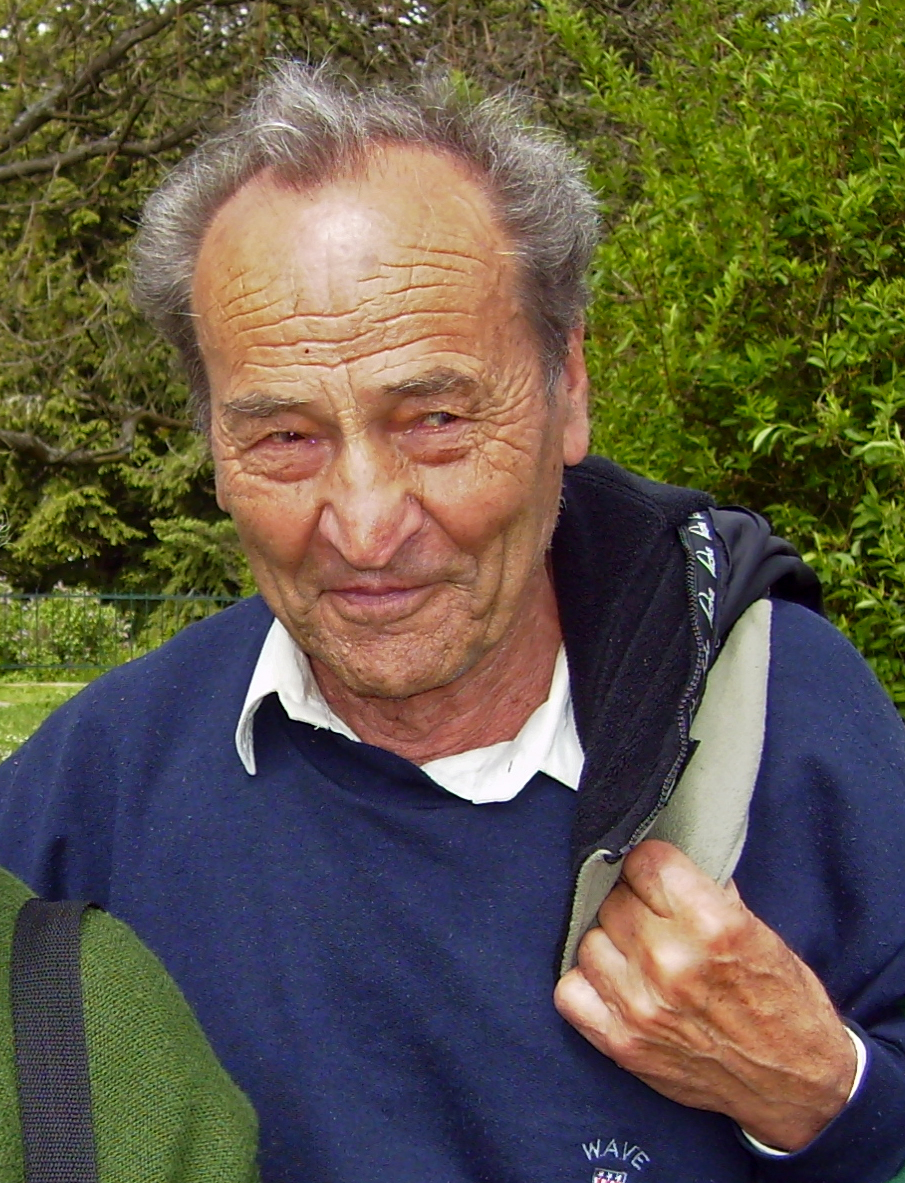 český astronom Josip Kleczek v Ondřejovské hvězdárně.